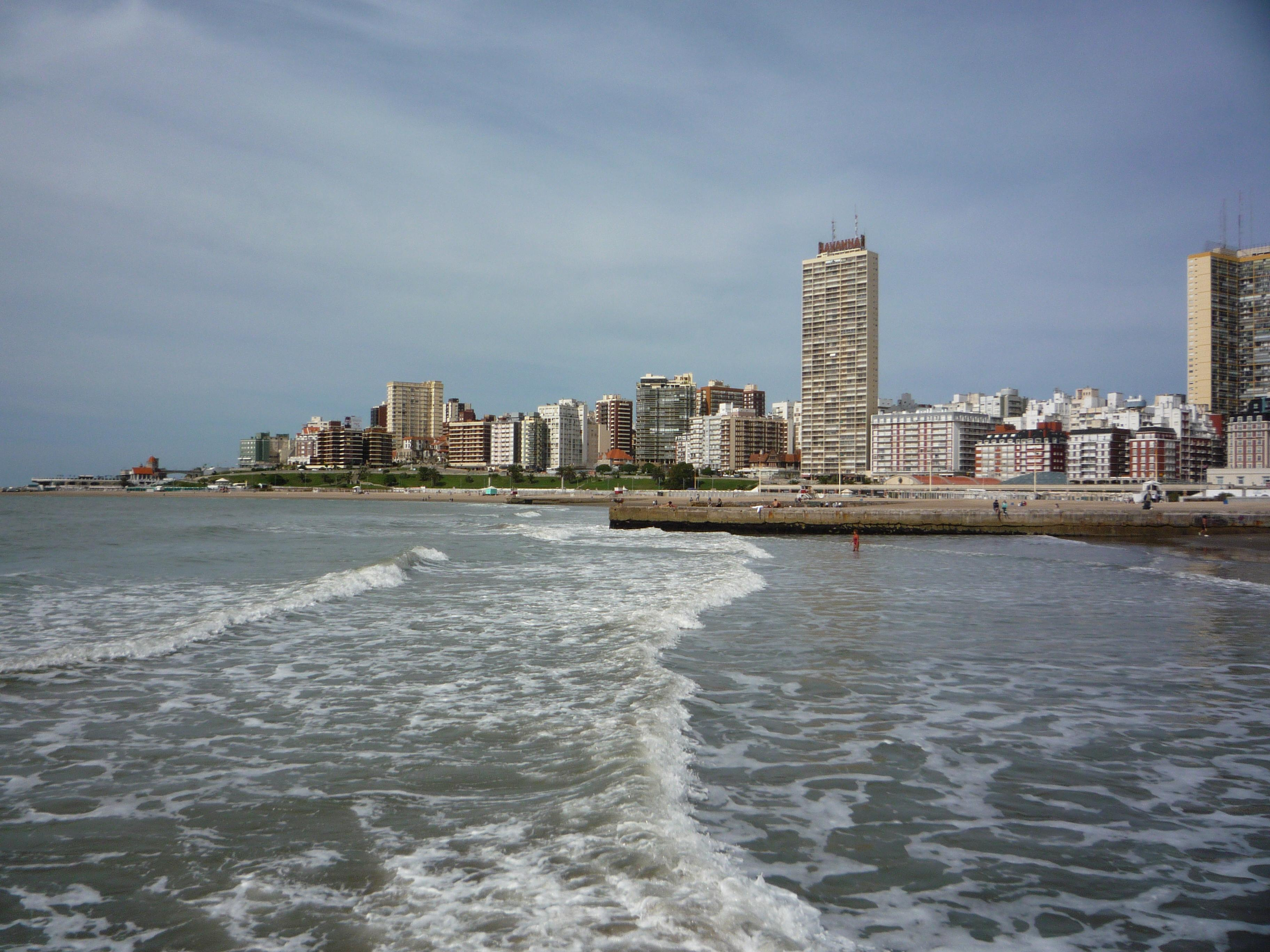 Mar del Plata - Buenos Aires - Argentina